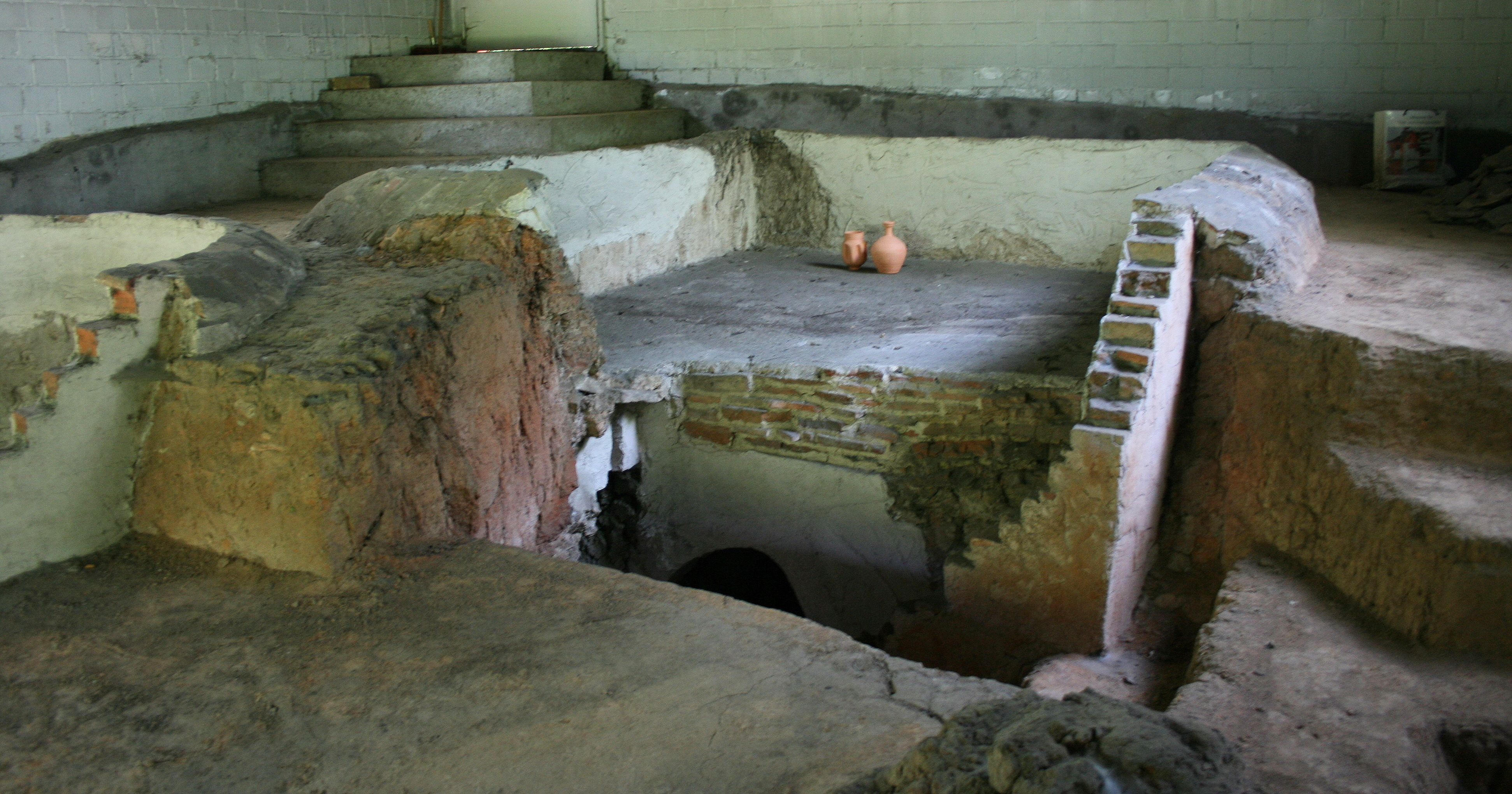 Restaurierter römischer Töpferofen in Frankfurt-Heddernheim (Römerstadt Nida). Der Ofen mit quadratischem Grundriss. Mit freundlicher Genehmigung des Archäologischen Museums Frankfurt.